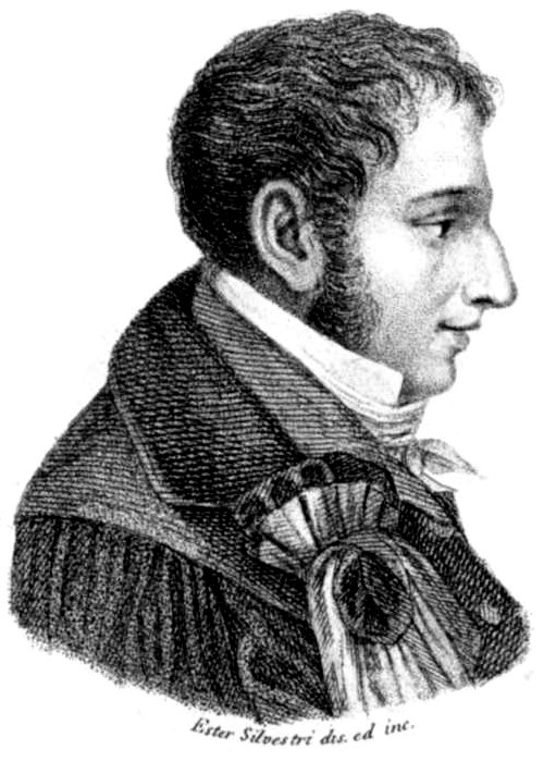 Ritratto di Cesare Arici